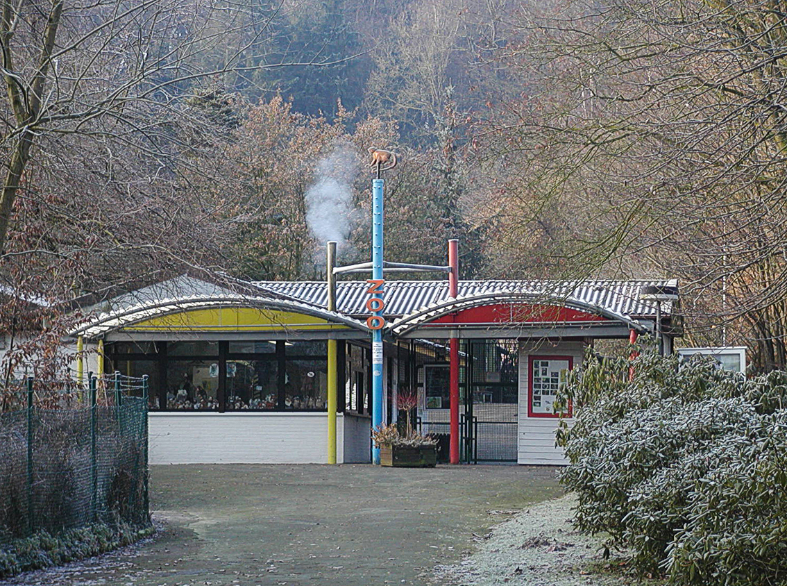 Der Eingang zum Wingster "Baby-Zoo"